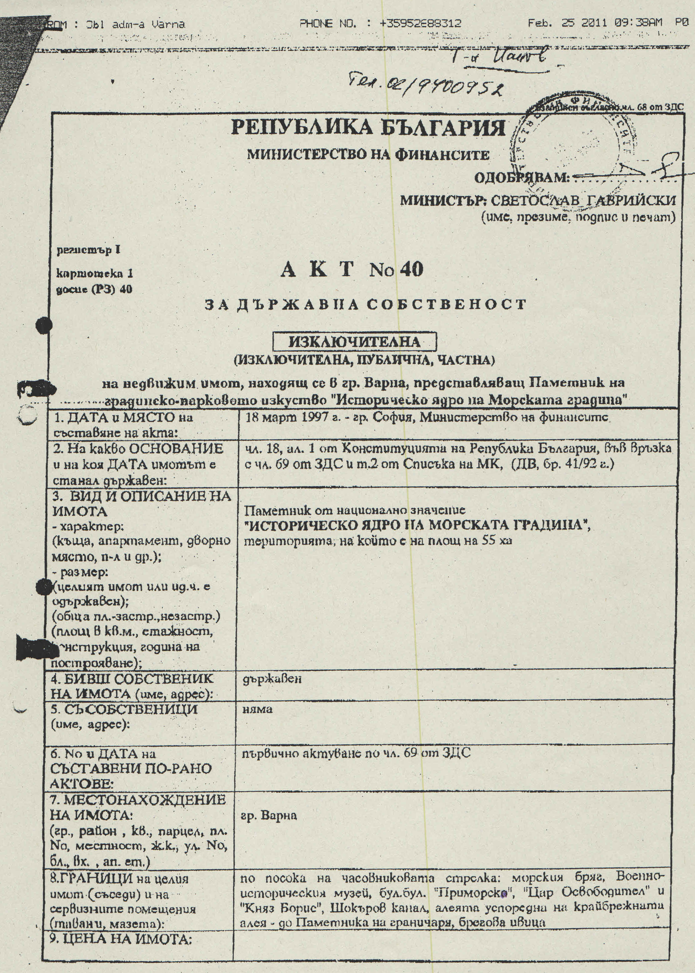 Акт №40 за държавна собственост от 550 декара върху историческото ядро на Морската градина на гр. Варна